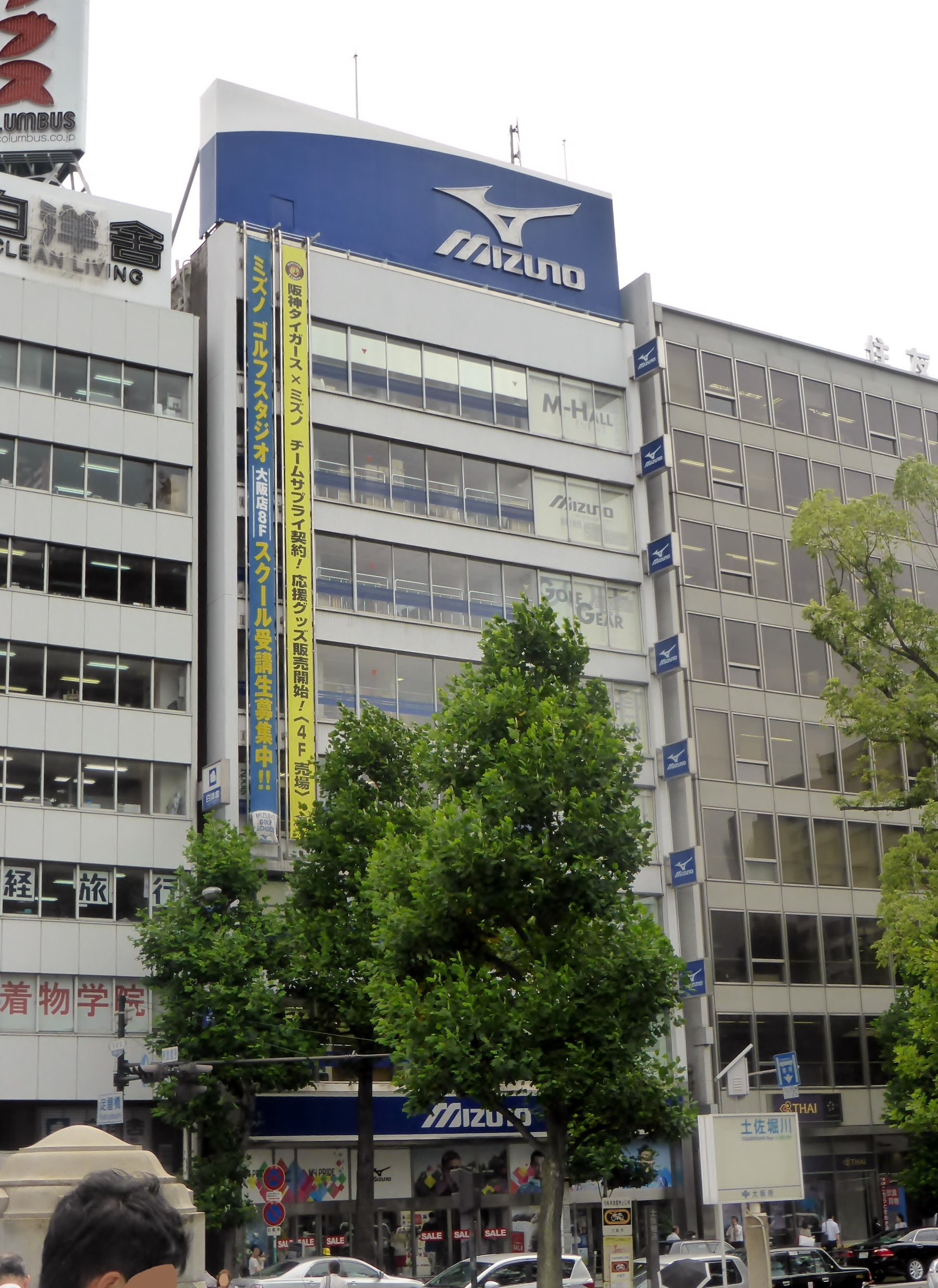 2014年7月18日時点の美津濃株式会社本店を撮影。